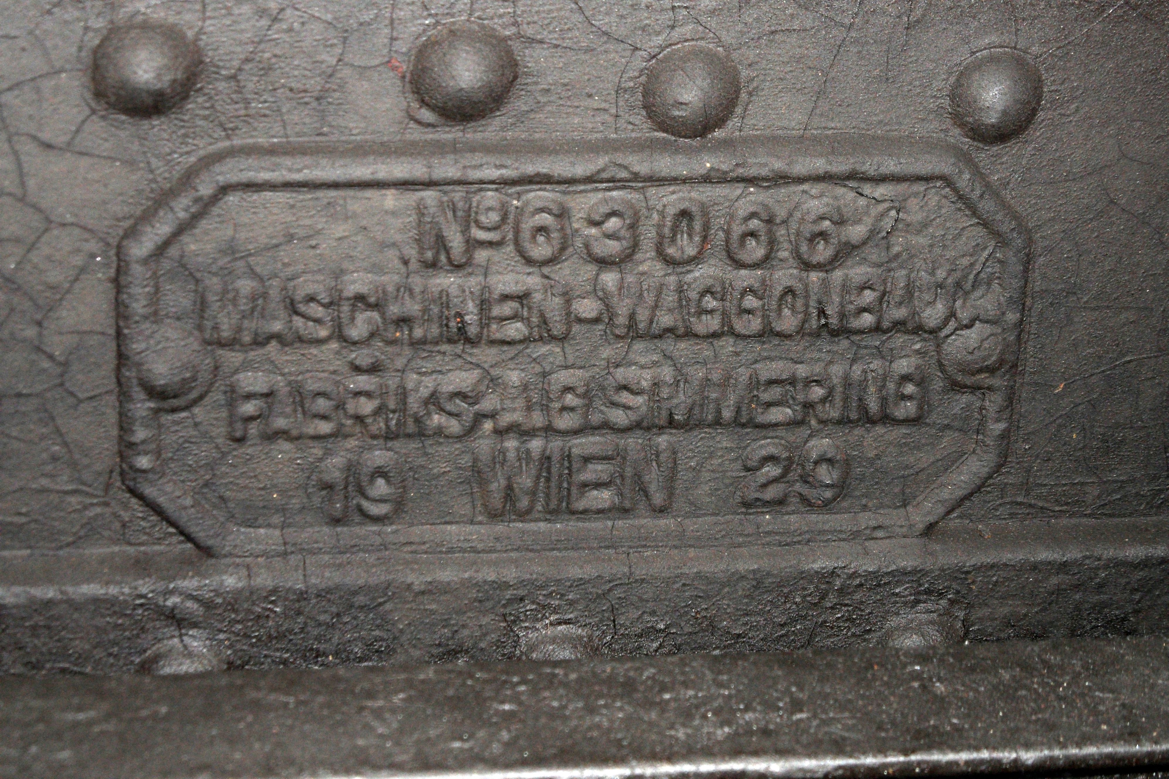 »Maschinen-Waggonbau-Fabrik Simmering« 1929, das Fabrikschild ist am Laufgestell befestigt (und schon mehrmals überstrichen worden).